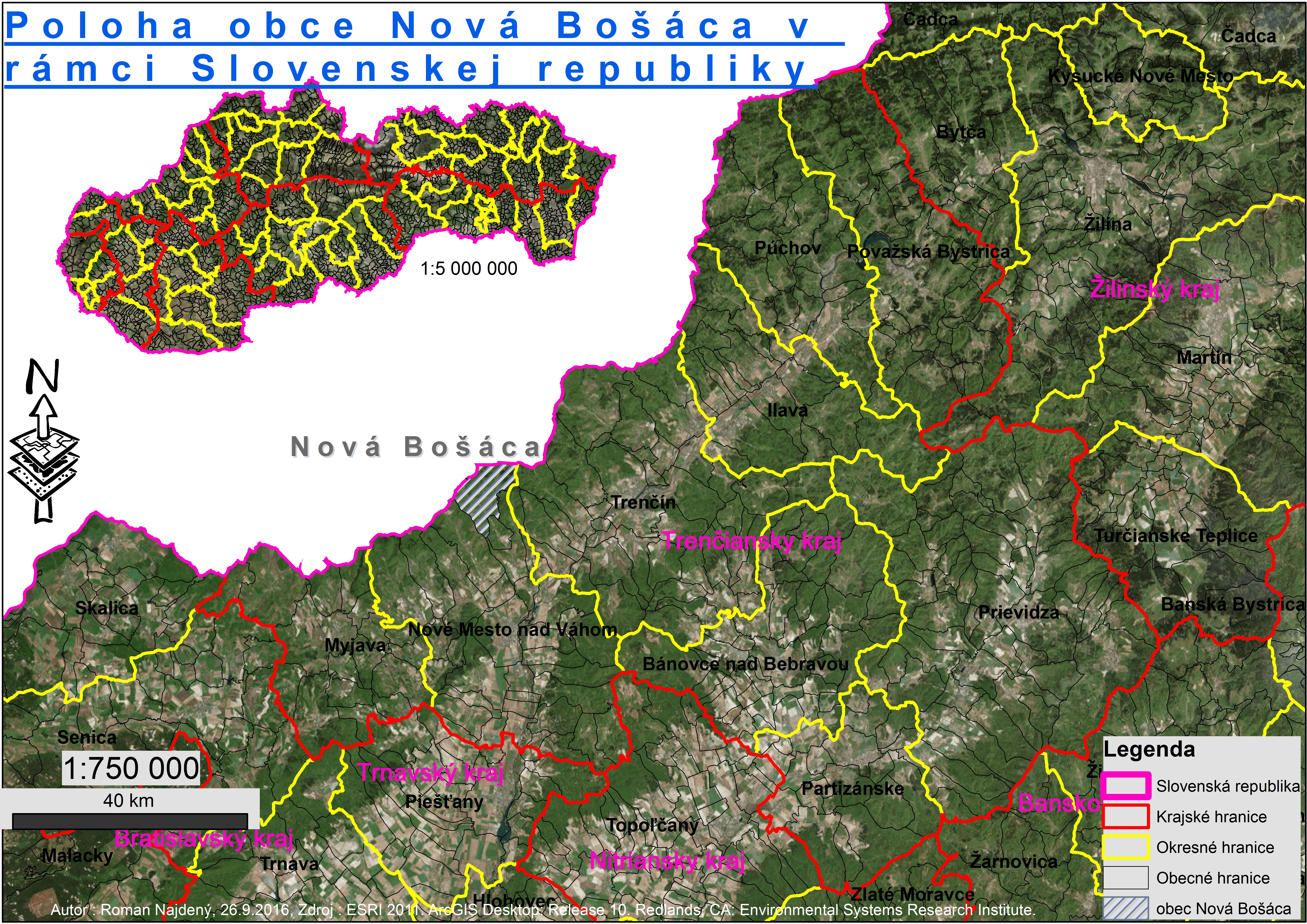 Poloha obce Nová Bošáca v rámci Slovenskej republiky